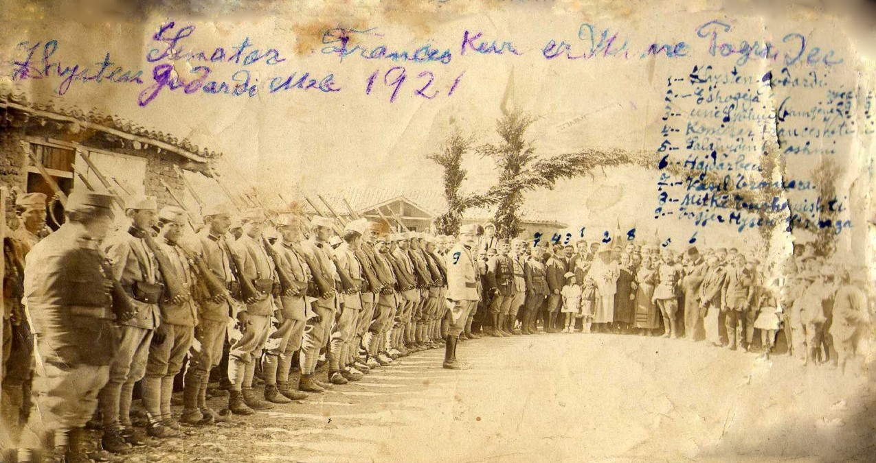 Pamje nga vizita e senatorit francez Zhysten Godard ne Pogradec me 1921 .Mes tyre me numur (3) Syhbi Beli